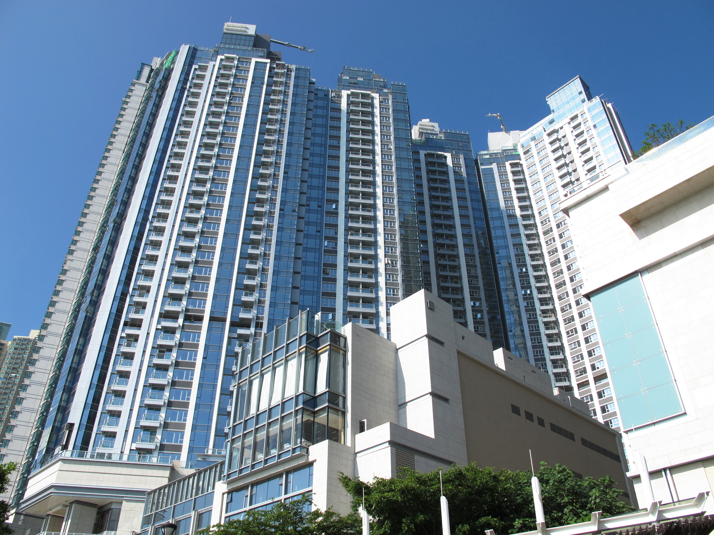 Imperial Cullinan 瓏璽